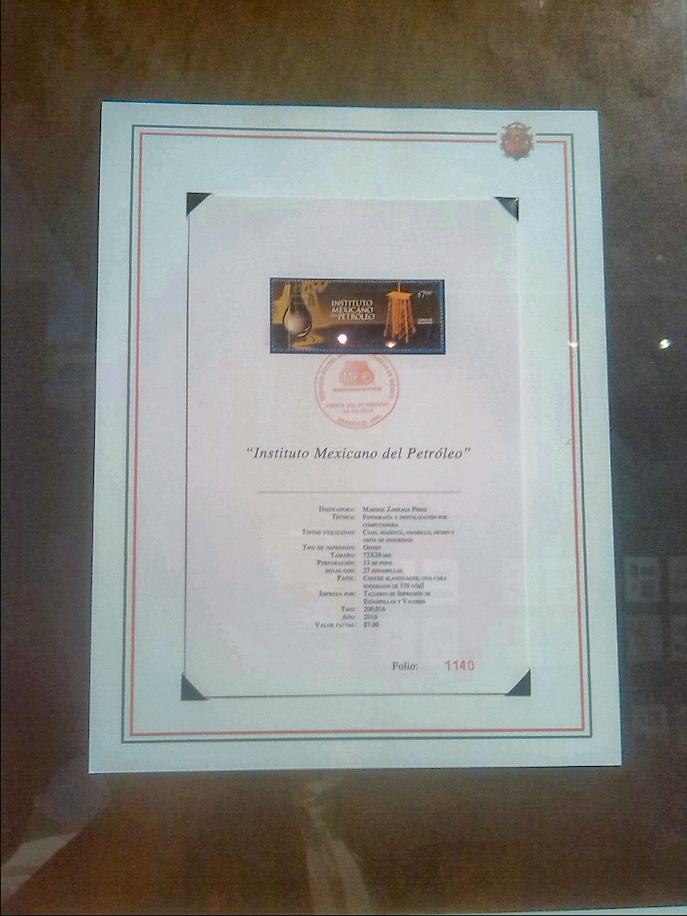 Sello postal del Instituto Mexicano del Petróleo